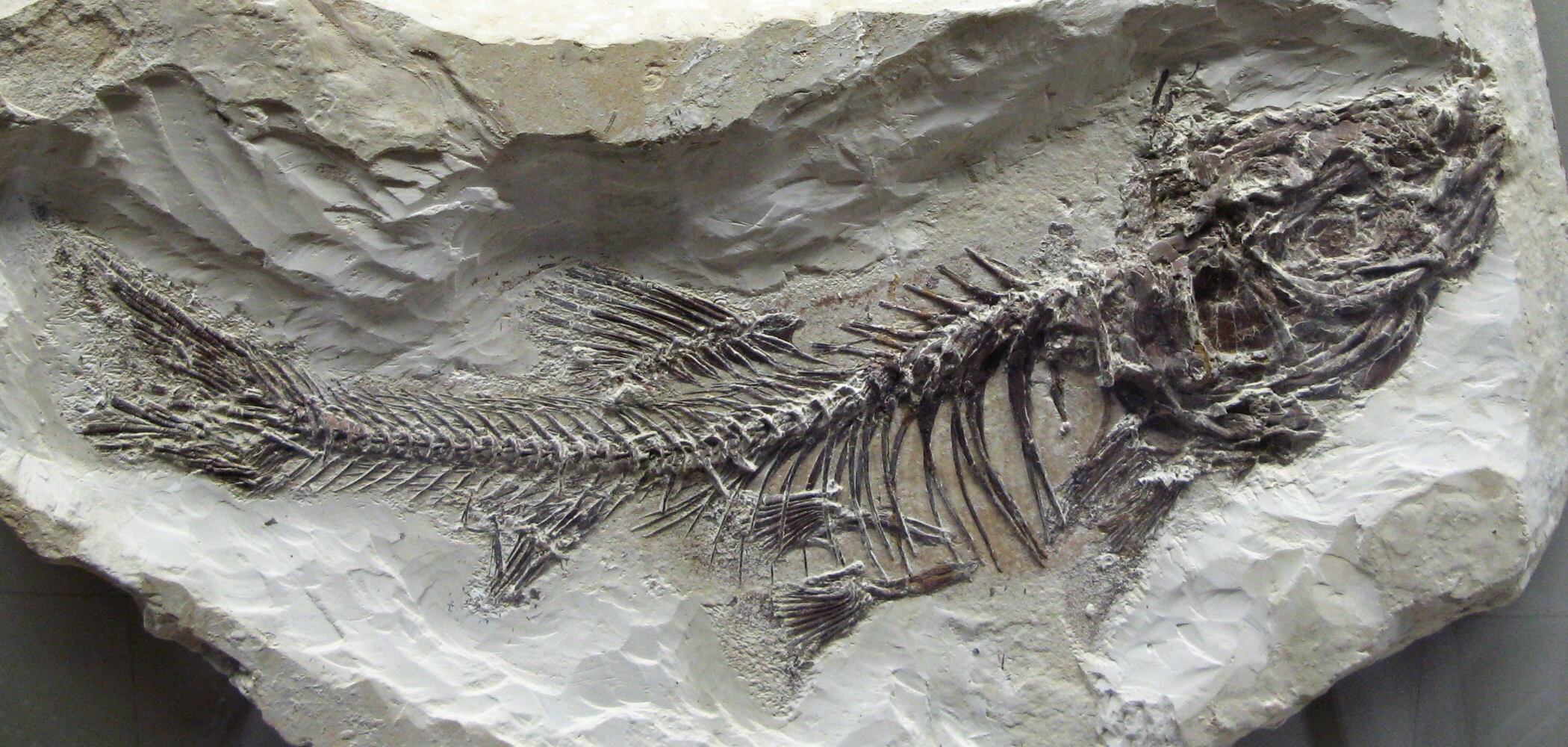 Fossile Schleie (Tinca), ausgewachsenes Exemplar mit Schuppenabdrücken - aufgenommen im Museum am Löwentor, Stuttgart